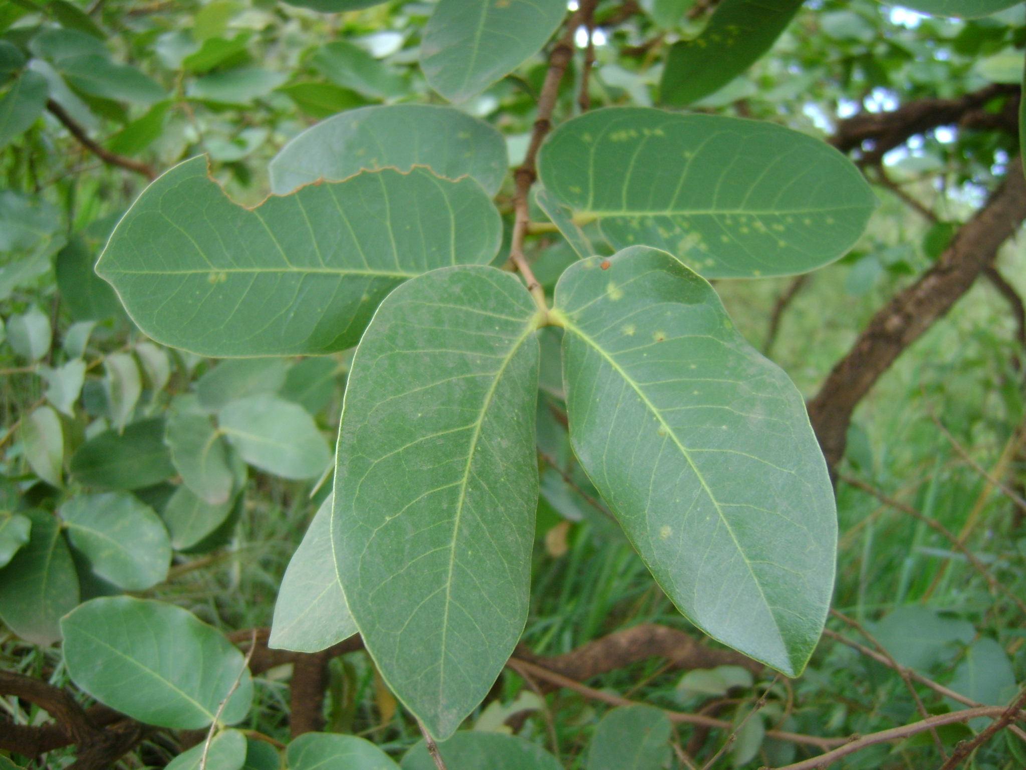 Folha de Jatobá-do-Cerrado, Hymenaea stigonocarpa Mart. ex Hayne.